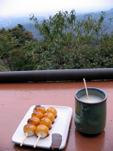 甘酒と焼だんご（東京八王子市高尾町2179、高尾山ケーブルカー高尾山駅から高尾自然動植物園に向かう途中にある食堂・茶屋「十一丁目茶屋」）